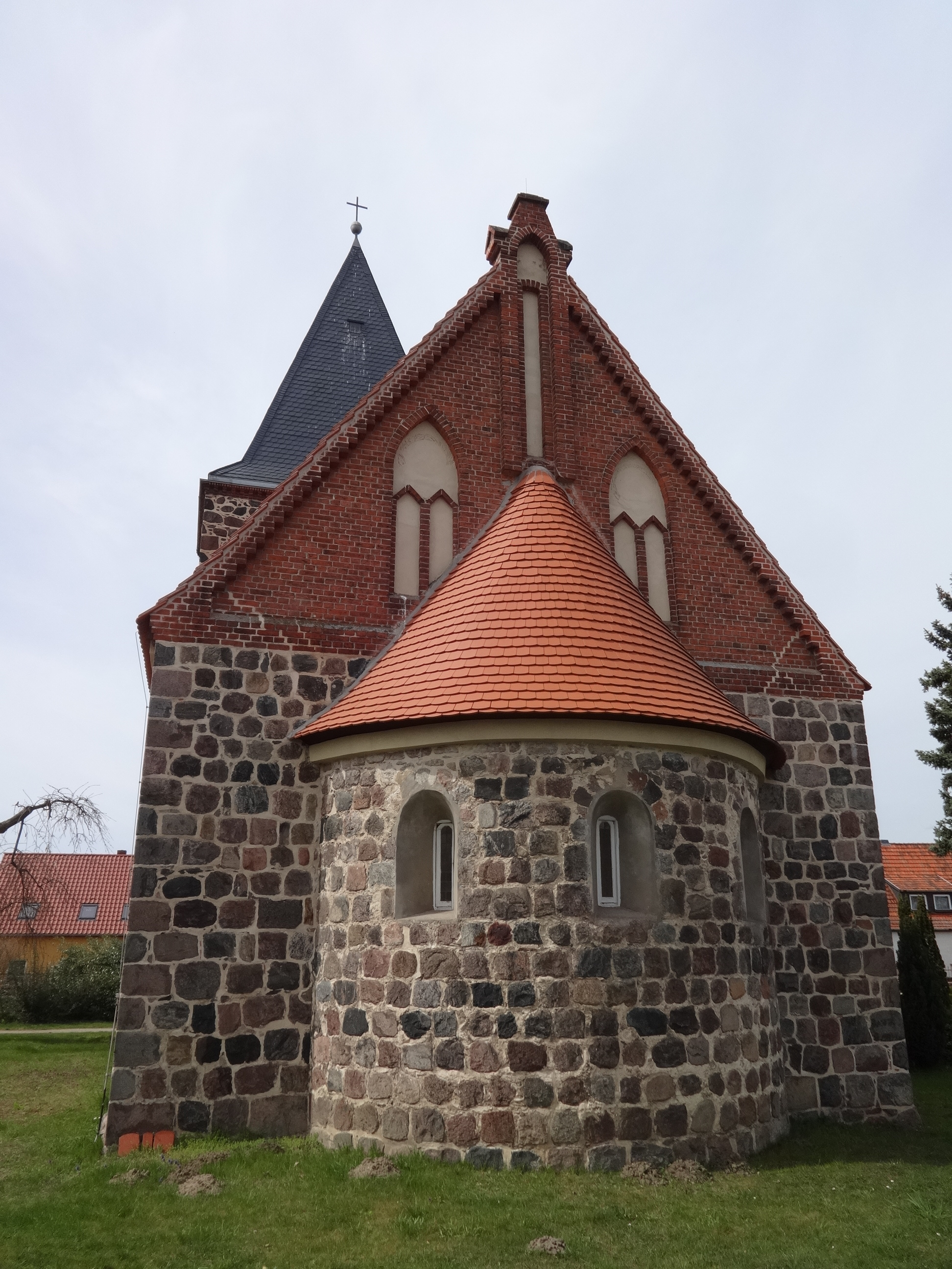 Die Dorfkirche Güterfelde ist eine Feldsteinkirche aus dem 13. Jahrhundert. Der zuvor eingezogene Chor wurde im Jahr 1867 von der Kirchengemeinde auf die Breite des Kirchenschiffs aufgemauert. Anfang des 21. Jahrhunderts wurde das Bauwerk saniert.